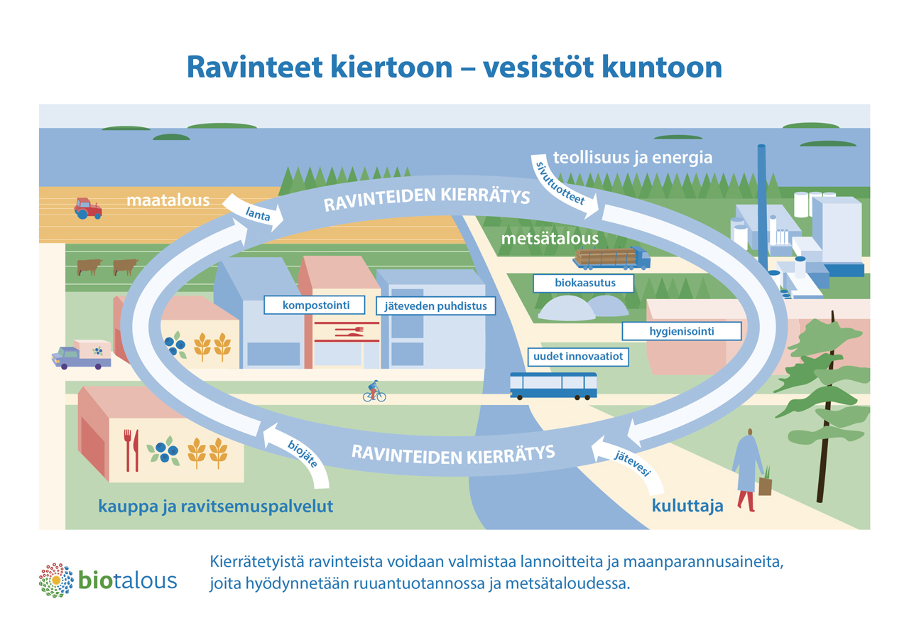 Ravinteet kiertoon - vesistöt kuntoon! Infografiikassa näytetään, mistä ravinteita luontoon päätyy ja miten niitä voidaan hyötykäyttää.